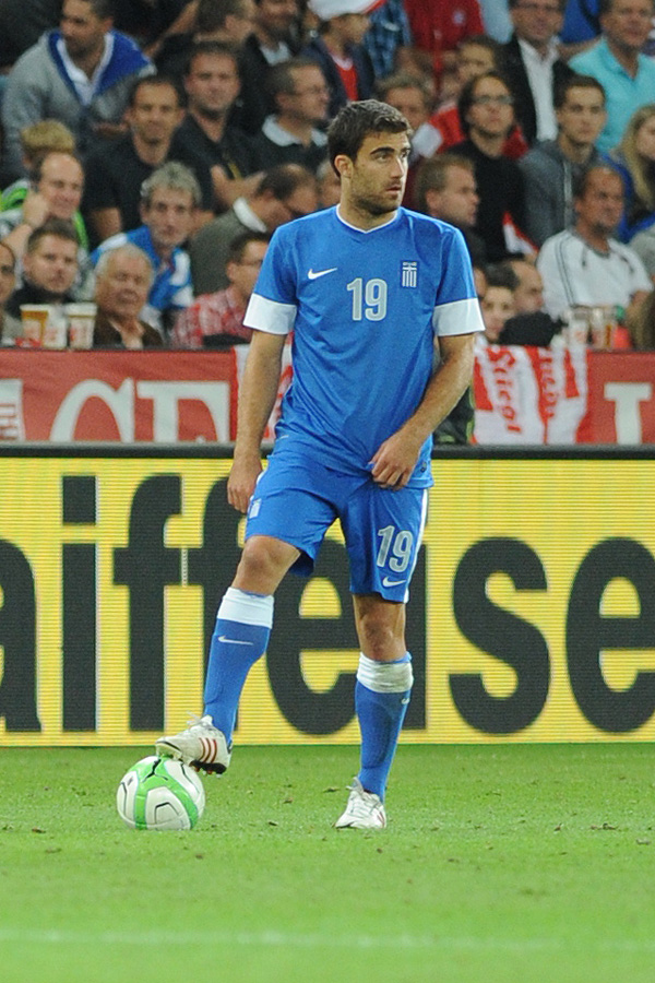 Freundschaftliches Länderspiel Österreich - Griechenland am 14. August 2013 in Salzburg: Sokratis Papastathopoulos